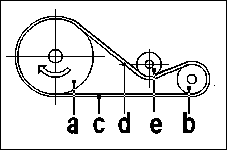 Schema eines Riemengetriebe a: Antriebsrad b: Abtriebsrad c: Lasttrum d: Leertrum e: Spannrad in Wechselbiegung